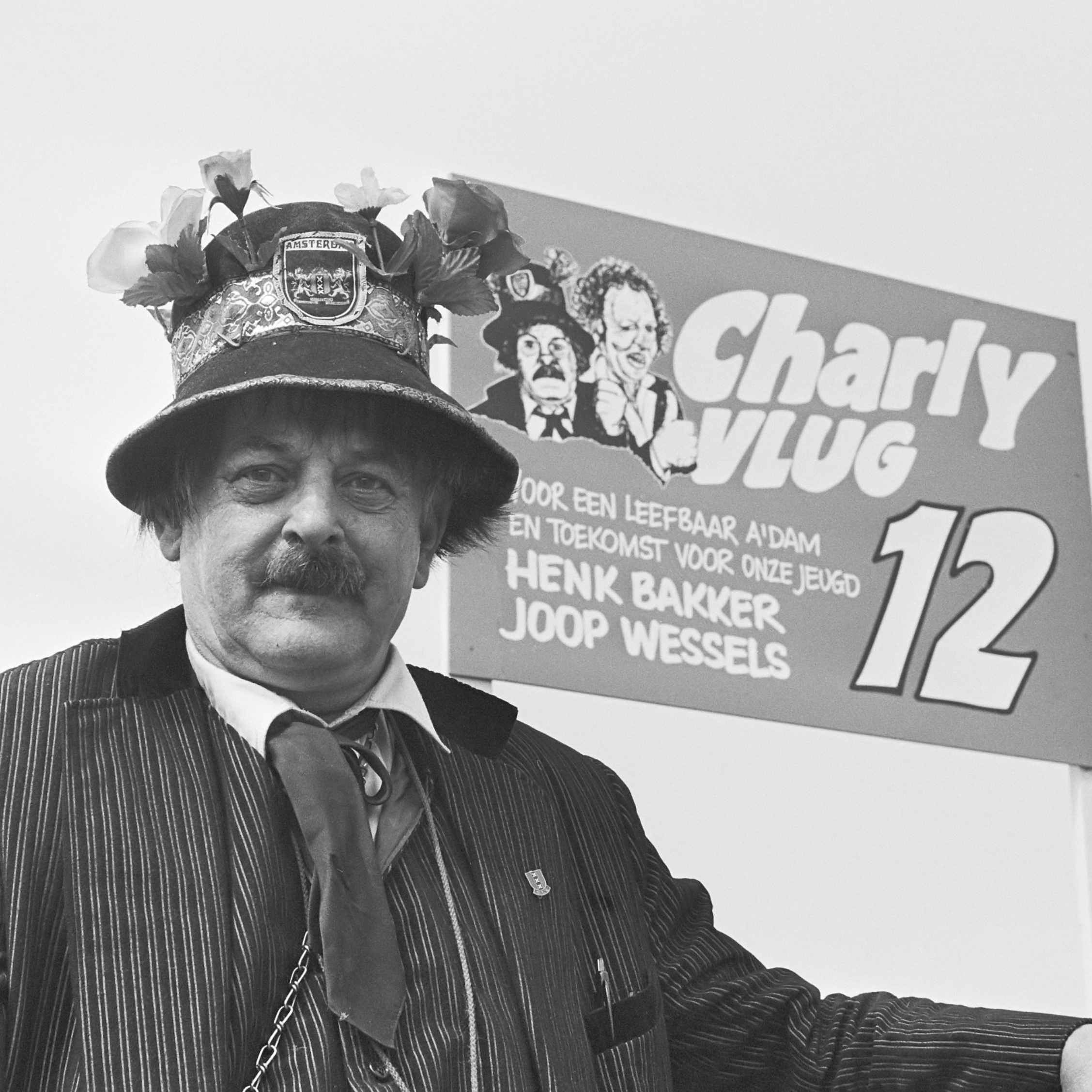 "Charly Vlug" (Charly de Sandwichman) verkiesbaar voor Amsterdamse gemeenteraad (lijst 12); Charly Vlug met enkele borden 21 mei 1982